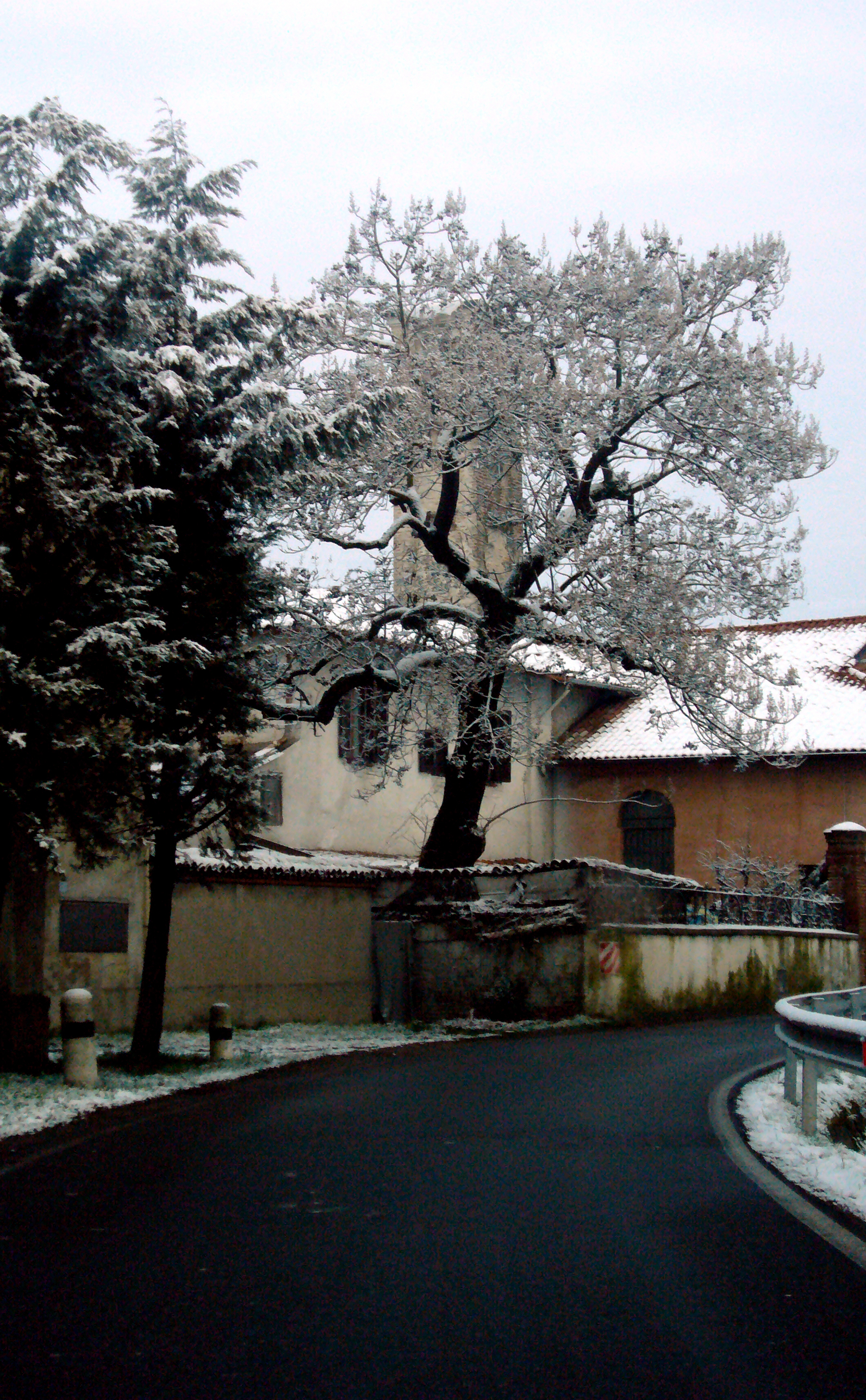 Cassignanica, Rodano.